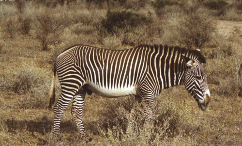 Grevýzebra. Foto gemaakt in Noord-Kenia, juni 1999, door mijzelf.